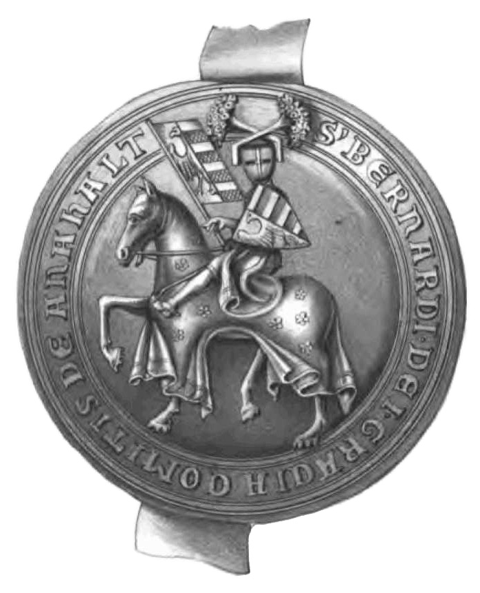 Siegel des Fürsten Bernhard II. von Anhalt-Bernburg (Original veröffentlicht im Codex diplomaticus anhaltinus, Band 2)